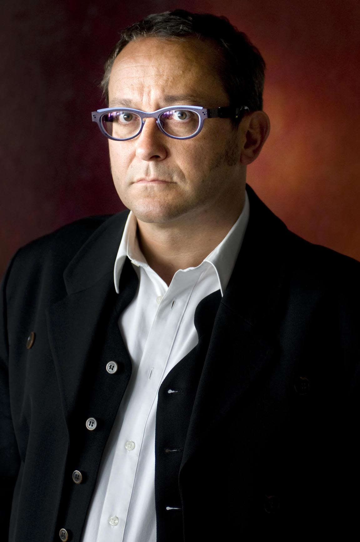 Schrijver Tom Lanoye